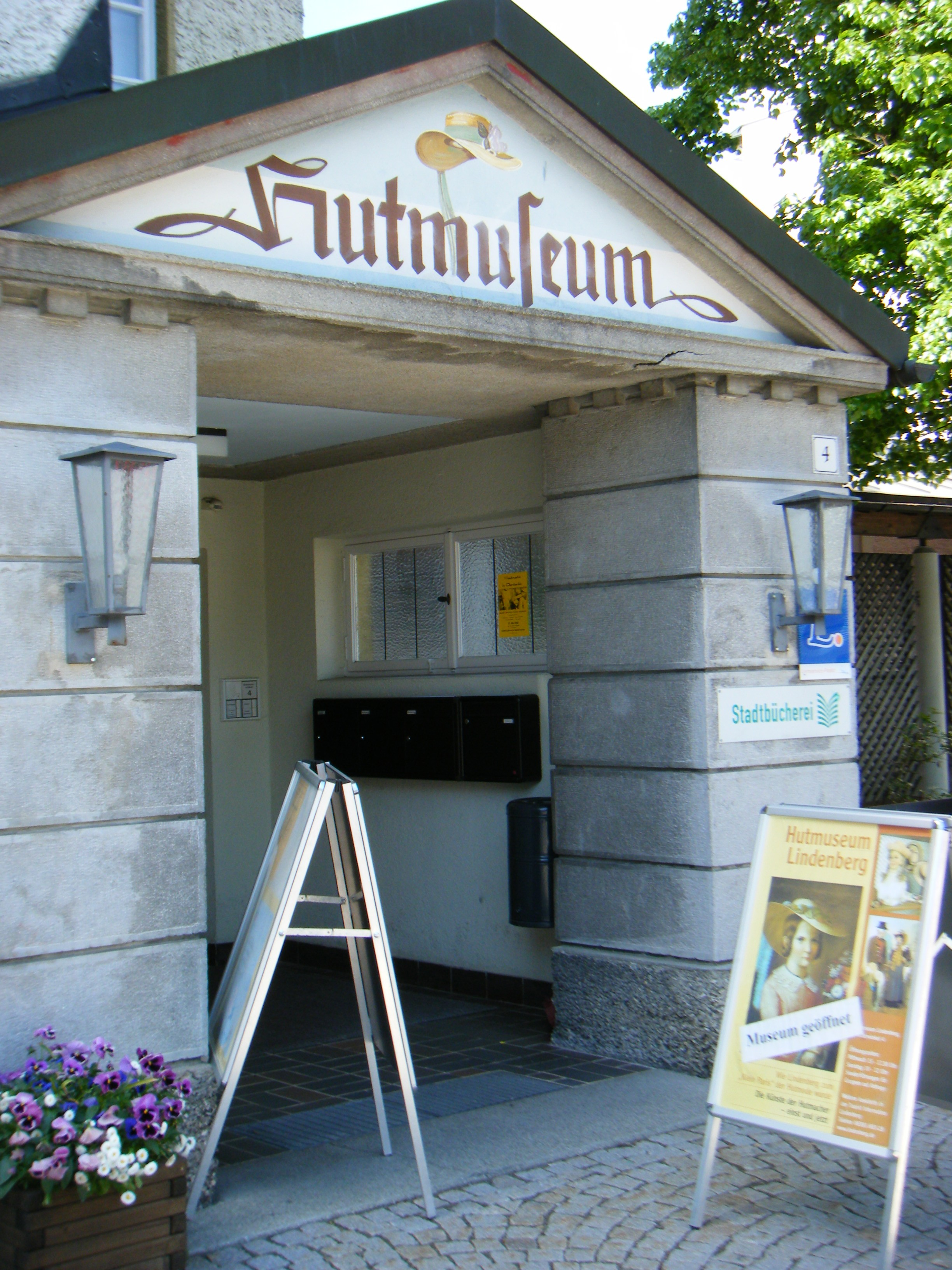 Deutsches Hutmuseum Lindenberg / Altes Gebäude (bis 2013), Eingang